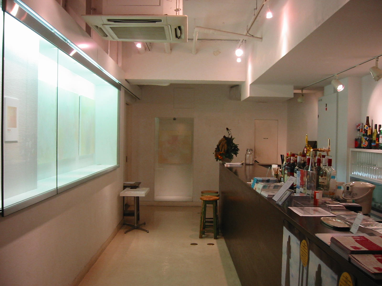 Uplink Galleryを撮影したもの。